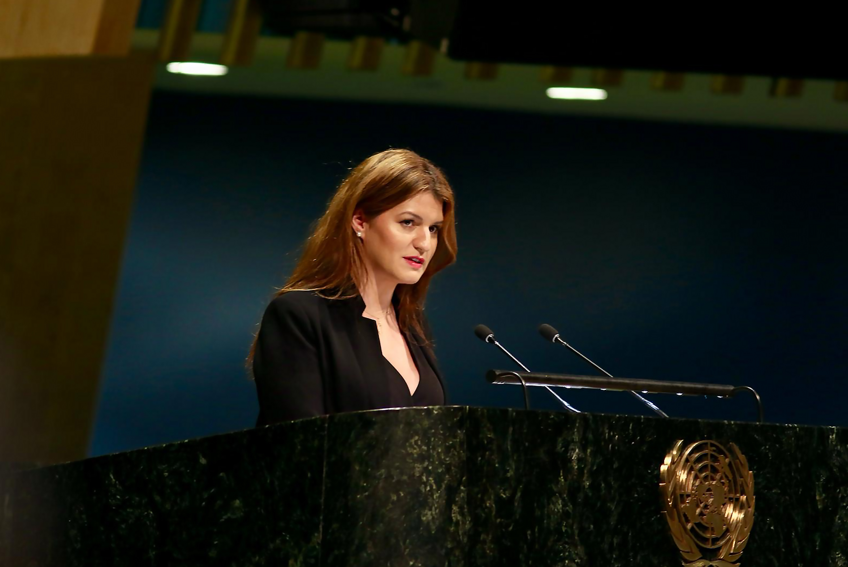 Marlène Schiappa, Secrétaire d'Etat auprès du Premier ministre, chargée de l'Egalité entre les femmes et les hommes et de la Lutte contre les discriminations, à la tribune de l'ONU lors de l'ouverture de la 63e session de la conférence sur la condition féminine en mars 2019.